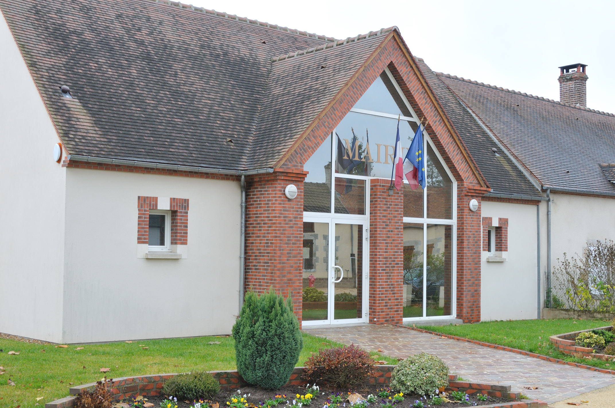 Mairie, Sully-la-Chapelle, Loiret, France